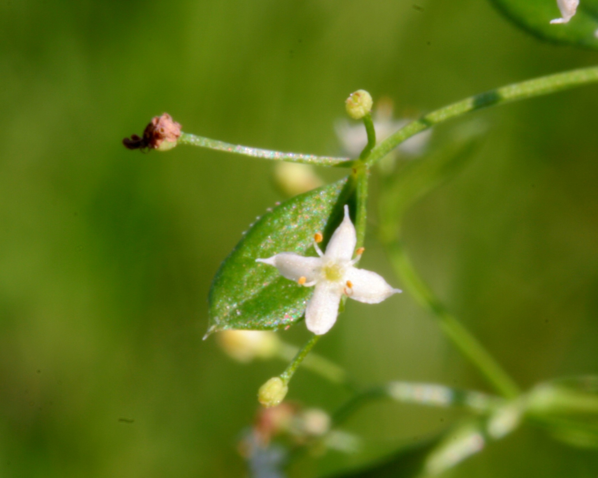 Galium_album - Località : Villa Prima, Limana (BL), 350 m s.l.m.